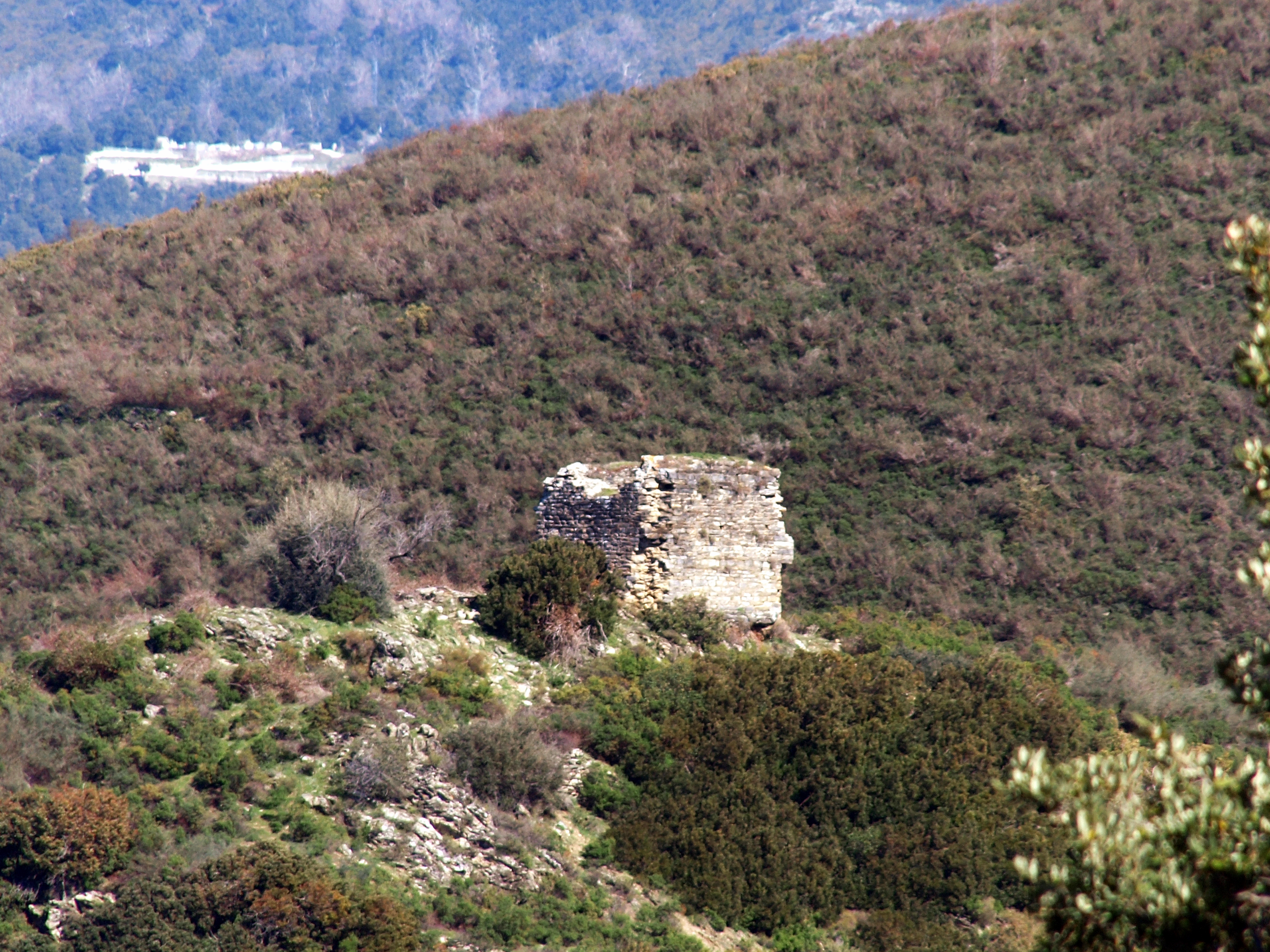 Corsu: E Valle di Rustinu, Rustinu (Corsica) - Ruderu di u "Tourione"